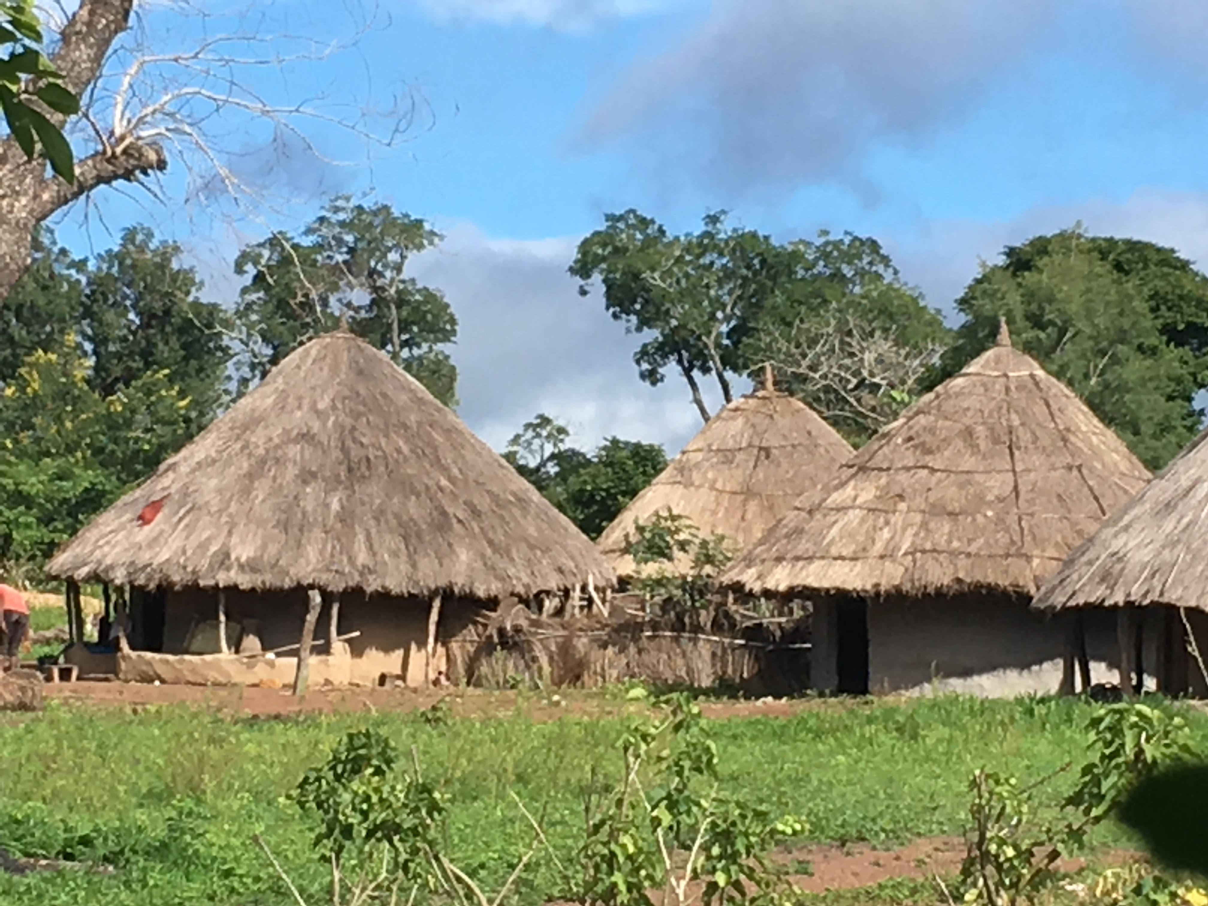 Rundhäuser im Dorf Kondebou